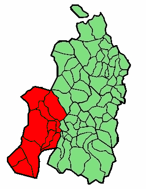 aipaturiko eskualdearen kokapena Nafarroa Beherean